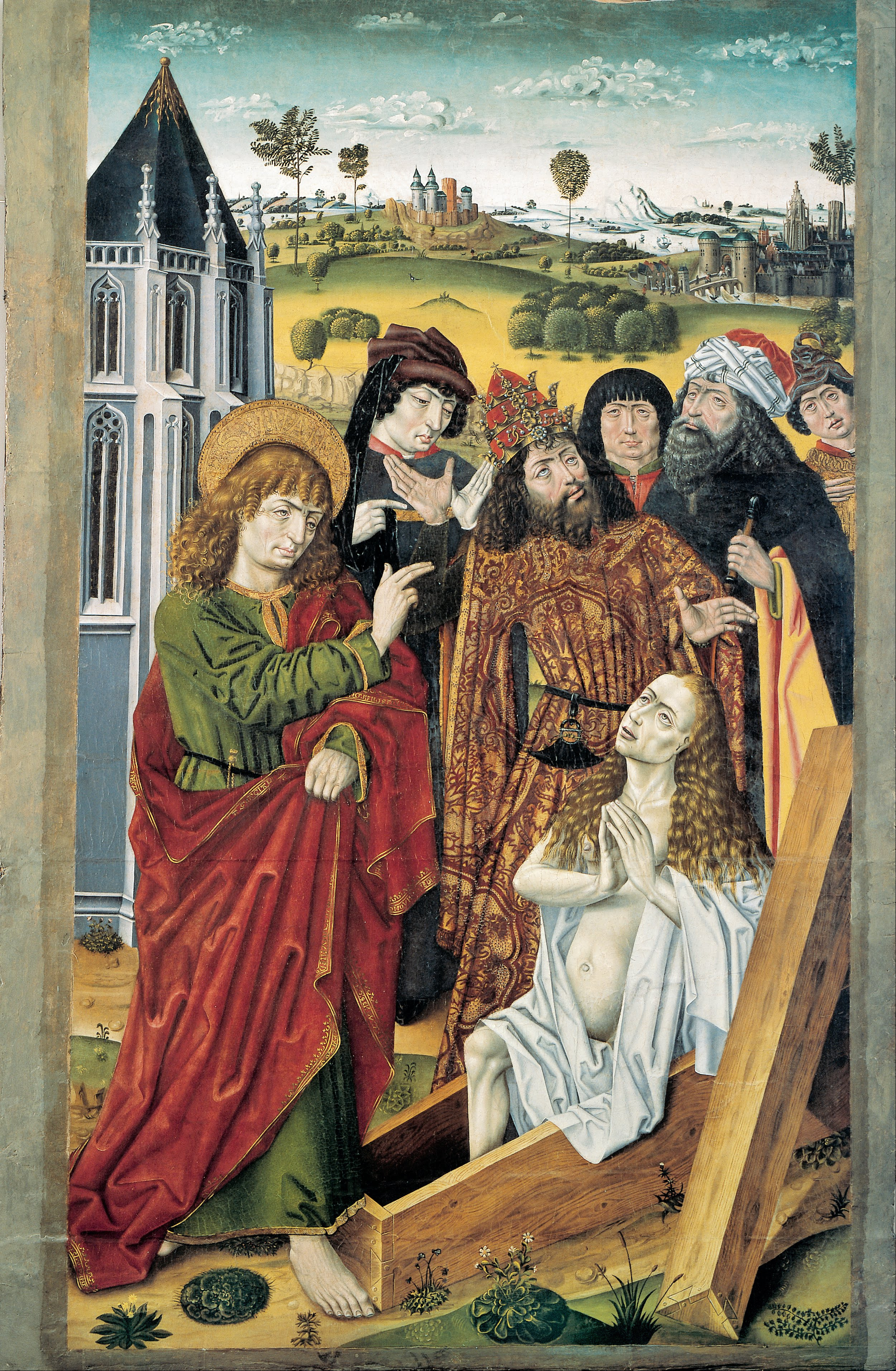 El lienzo representa el milagro de la resurrección de Drusiana, que según la tradición Cristiana fue resucitada por el apóstol San Juan Evangelista.